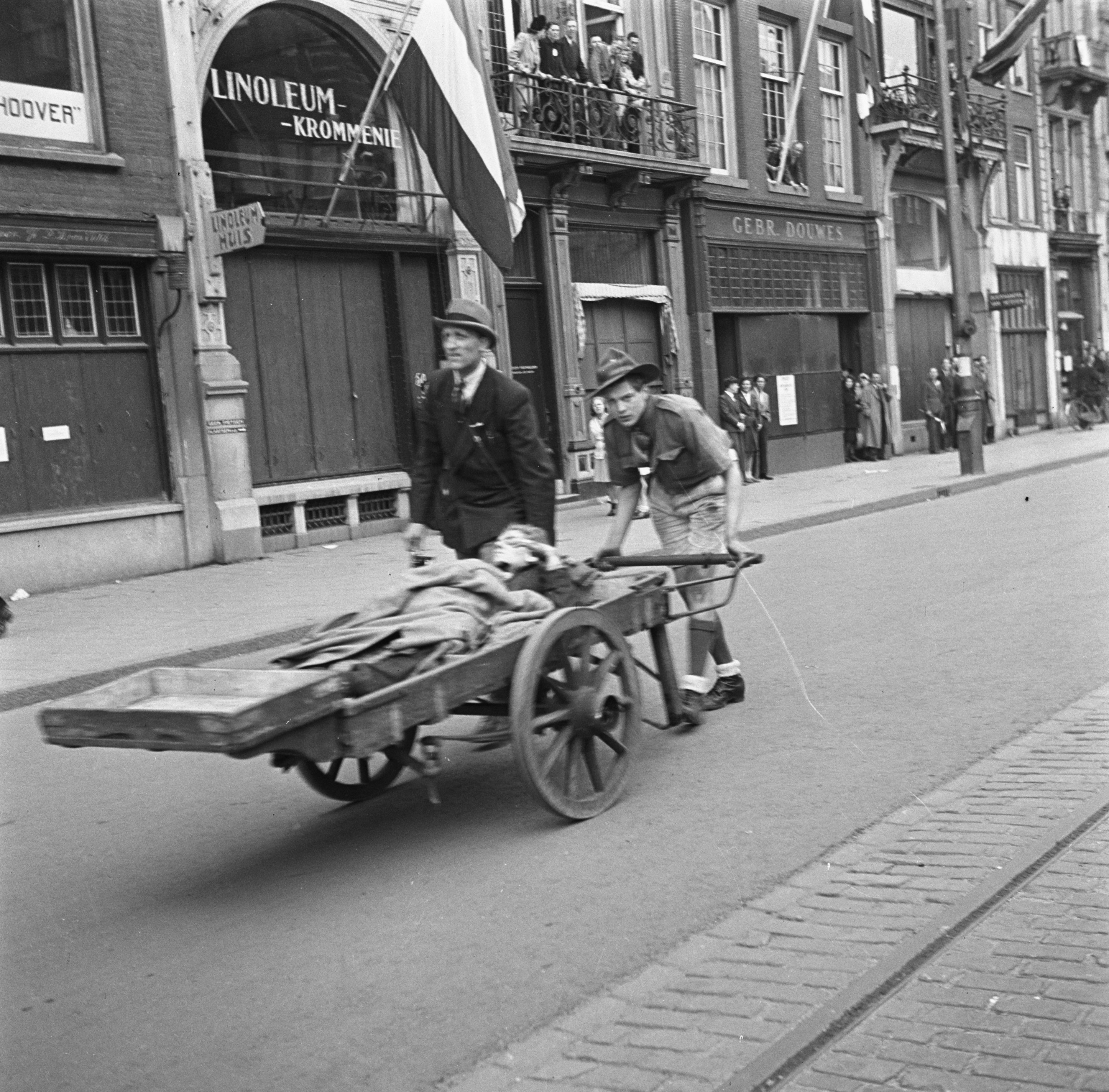 Collectie / Archief : Fotocollectie Anefo Reportage / Serie : Schietpartij op de Dam [7 mei 1945] Beschrijving : Slachtoffer van Duits mitrailleurvuur vanuit de Groote Club op de Dam wordt door een padvinder op een bakfiets afgevoerd Datum : 7 mei 1945 Locatie : Amsterdam, Noord-Holland Trefwoorden : bevrijding, slachtoffers Fotograaf : Poll, Willem van de / Anefo Auteursrechthebbende : Nationaal Archief Materiaalsoort : Negatief (zwart/wit) Nummer archiefinventaris : bekijk toegang 2.24.01.03 Bestanddeelnummer : 900-2947